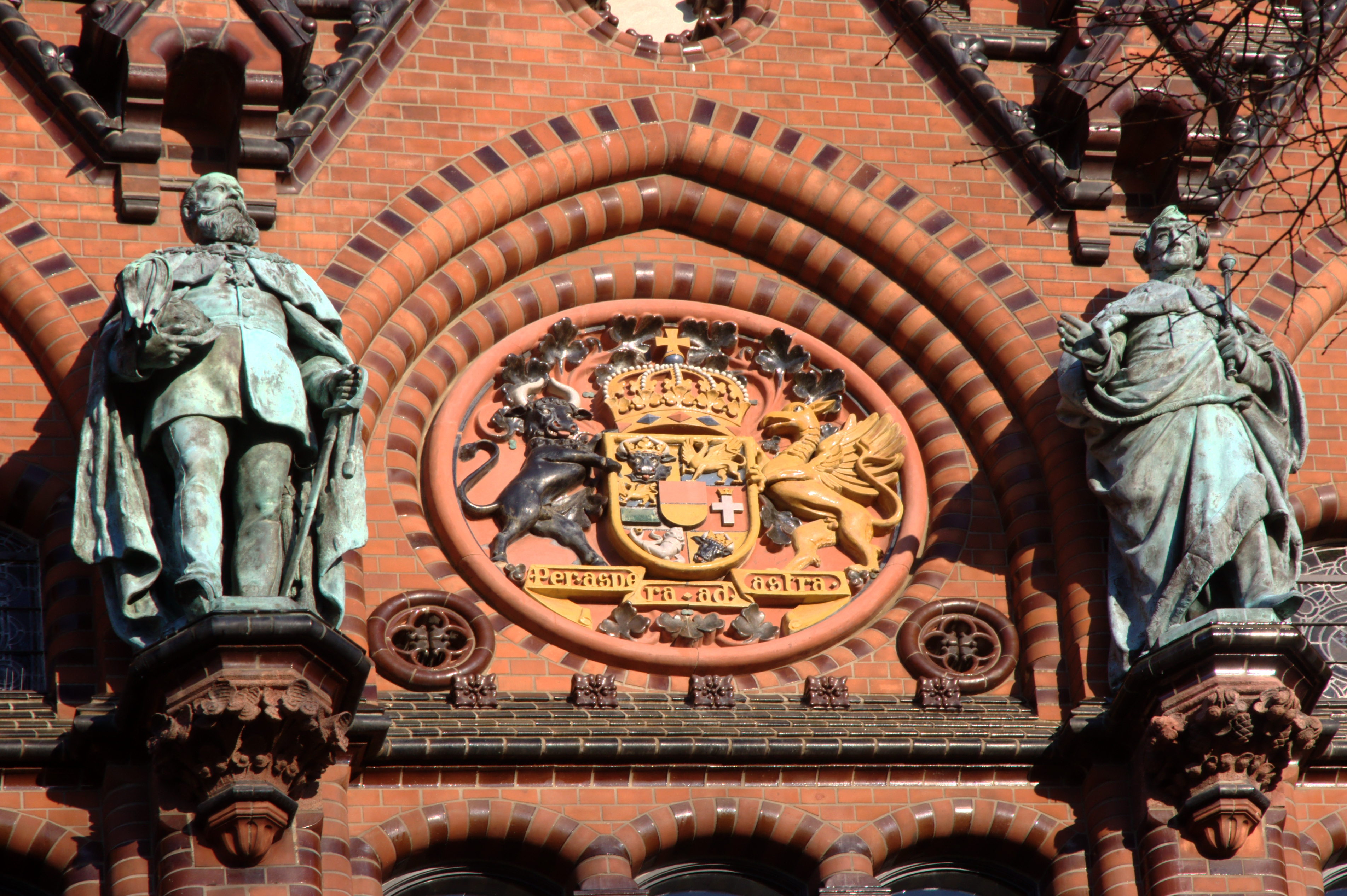 Wappen am Ständehaus Rostock mit Motto: „Per aspera ad astra“